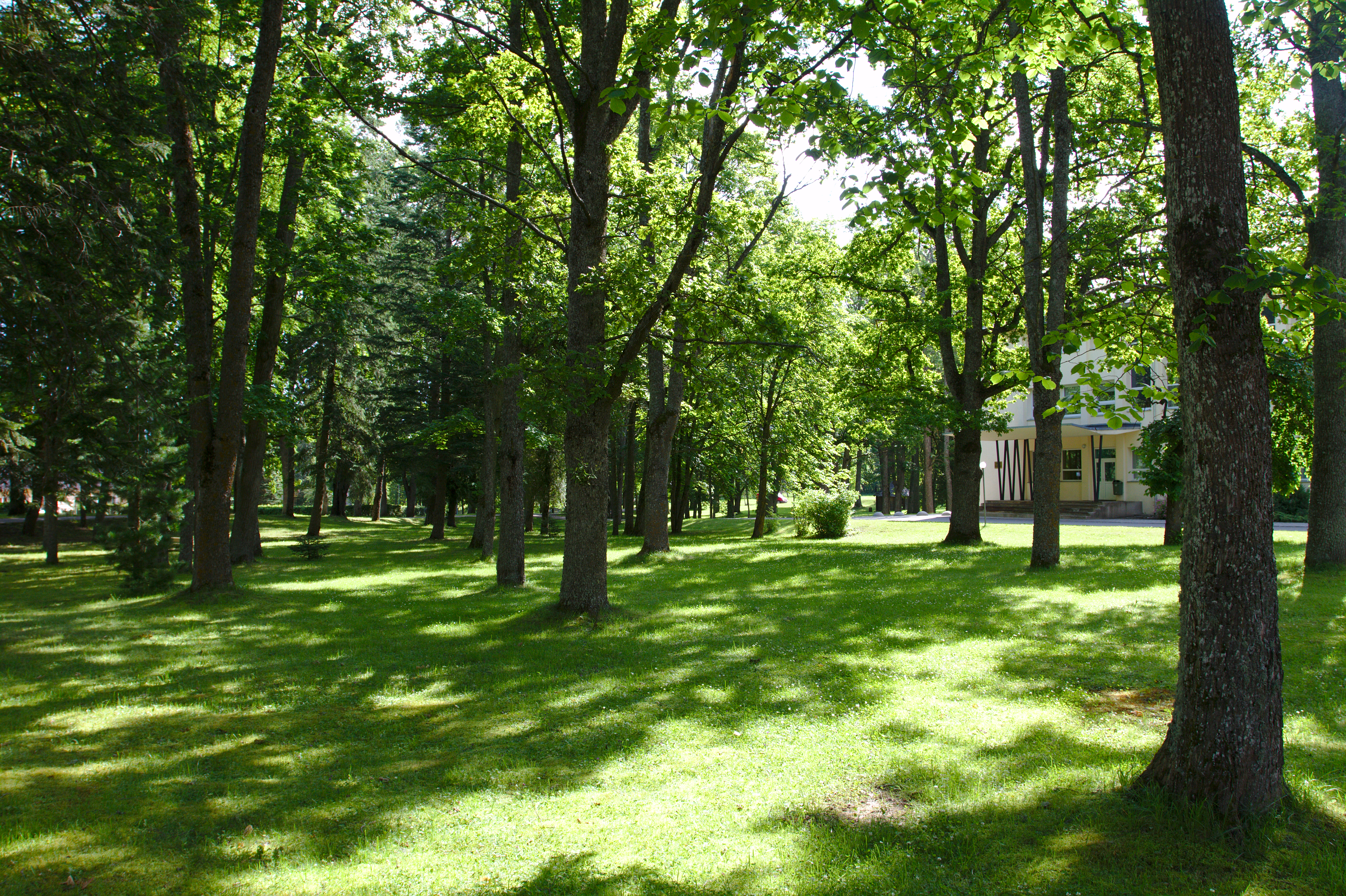 Krootuse mõisa park